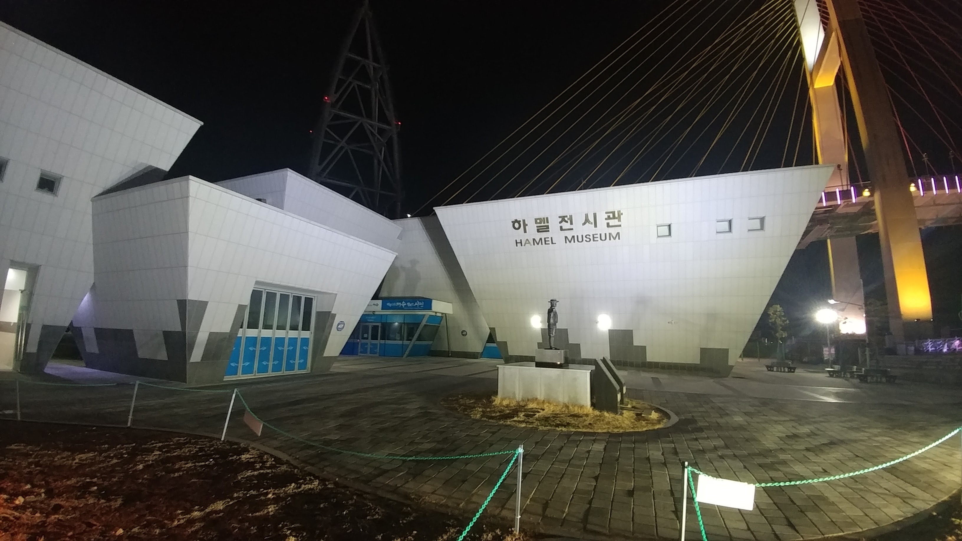 여수 하멜기념관